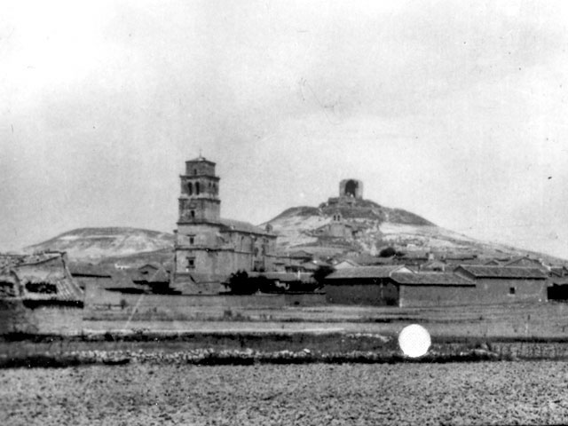 Vista panorámica - Mota del Marqués (Valladolid) - Cuaderno. Álbum de Valladolid - Fotografía 60 x 42 B/N